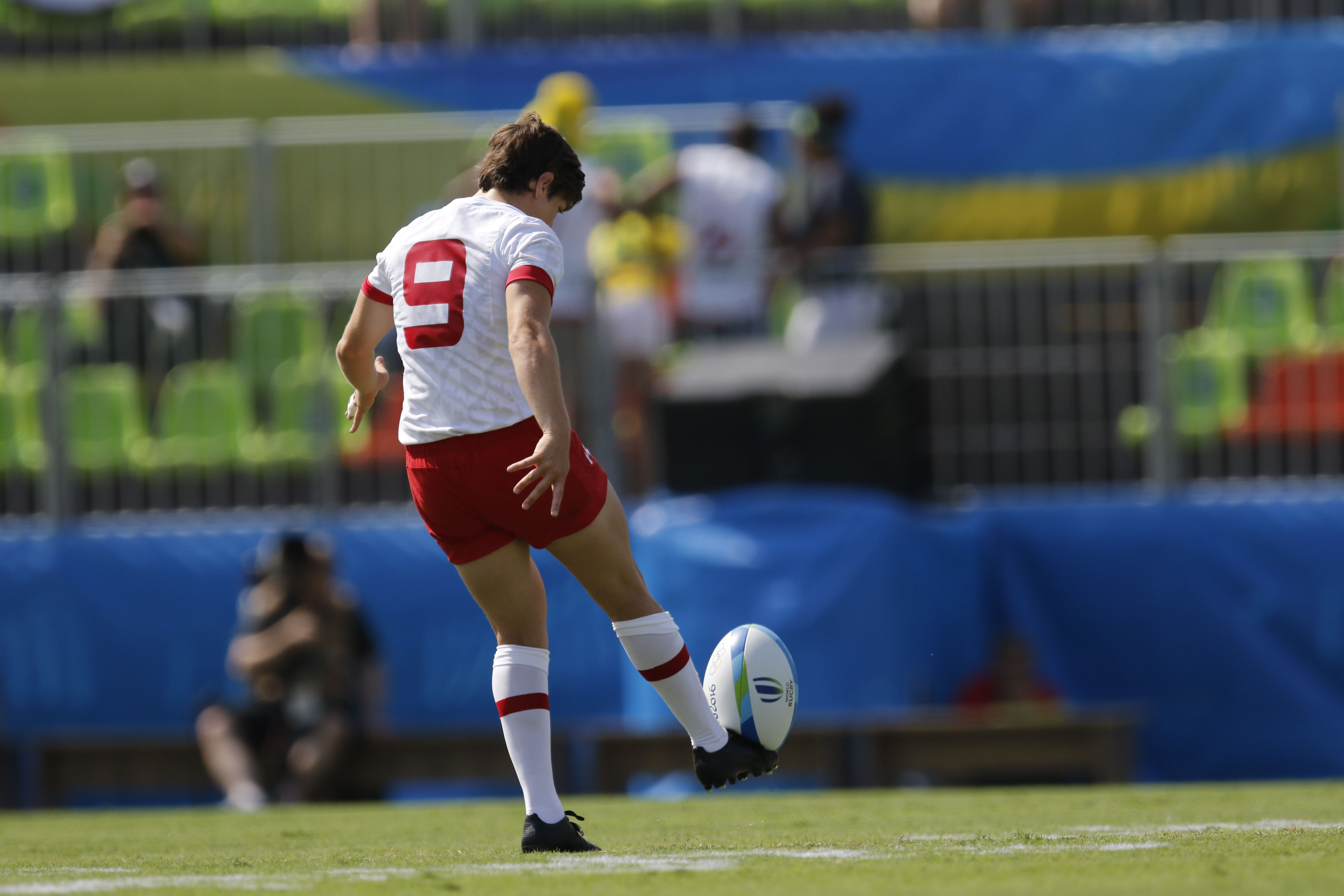 Rugby feminino: Canadá vence Japão por 45 a 0